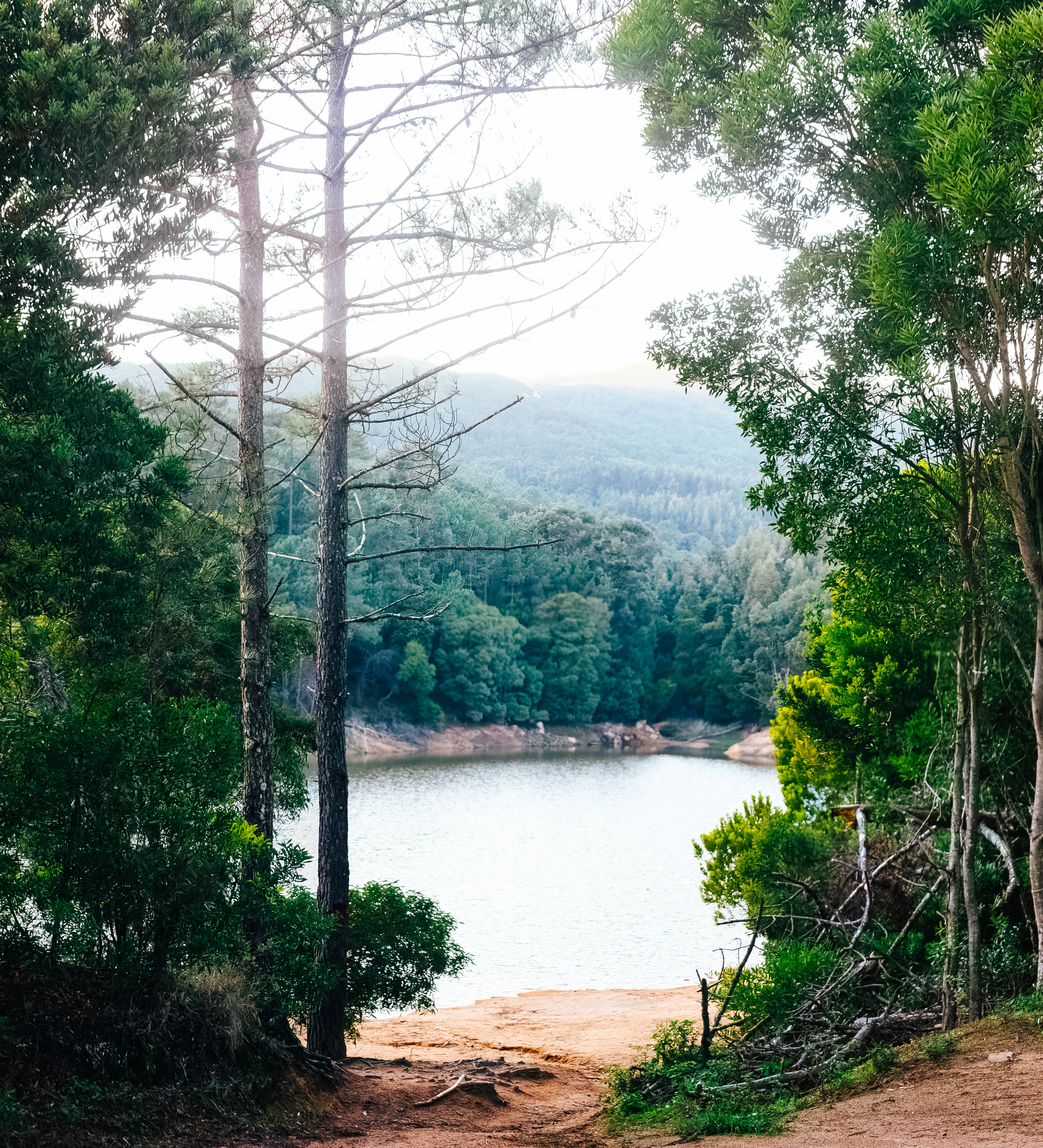 Barragem do Rio da Mula